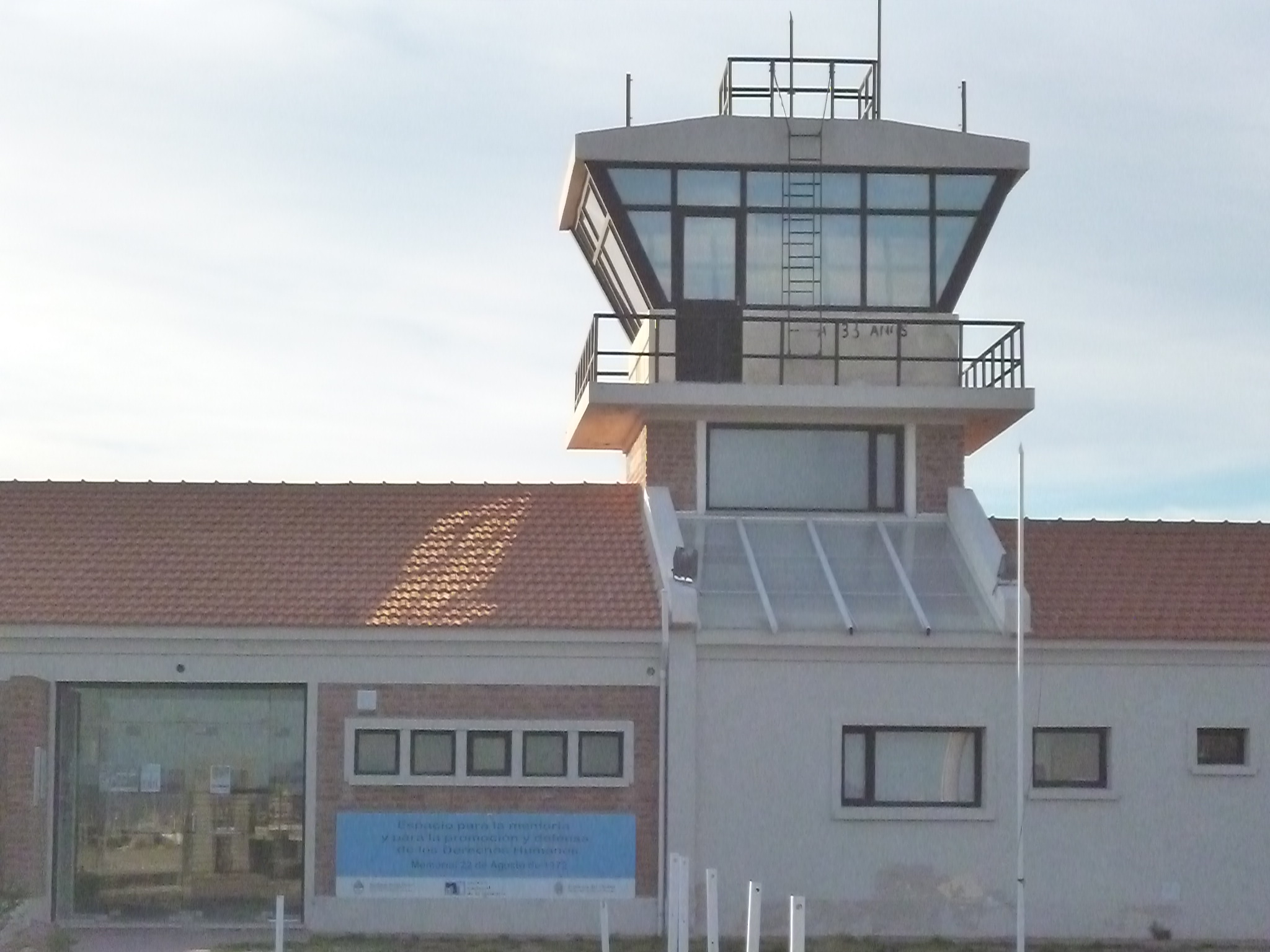 Aeropuerto Viejo de Trelew, actual Centro Cultural por la Memoria. Funcionó como terminal aérea entre 1938 y 1979, cuando fue reubicado. El 15 de agosto de 1972, 110 prisioneros políticos se fugaron del penal de Rawson y tomaron un BAC 1-11 de Austral que se dirigía a Buenos Aires, para dirigirse primero a Chile y después a Cuba. Los planes fallaron y 19 de ellos, que no lograron escaparse, decidieron tomar el edificio. Una patrulla militar bajo las órdenes del capitán de corbeta Luis Emilio Sosa, condujo a los prisioneros recapturados a la Base Aeronaval Almirante Zar. Allí fueron fusilados el 22 de agosto, en lo que se conoce como "Masacre de Trelew".